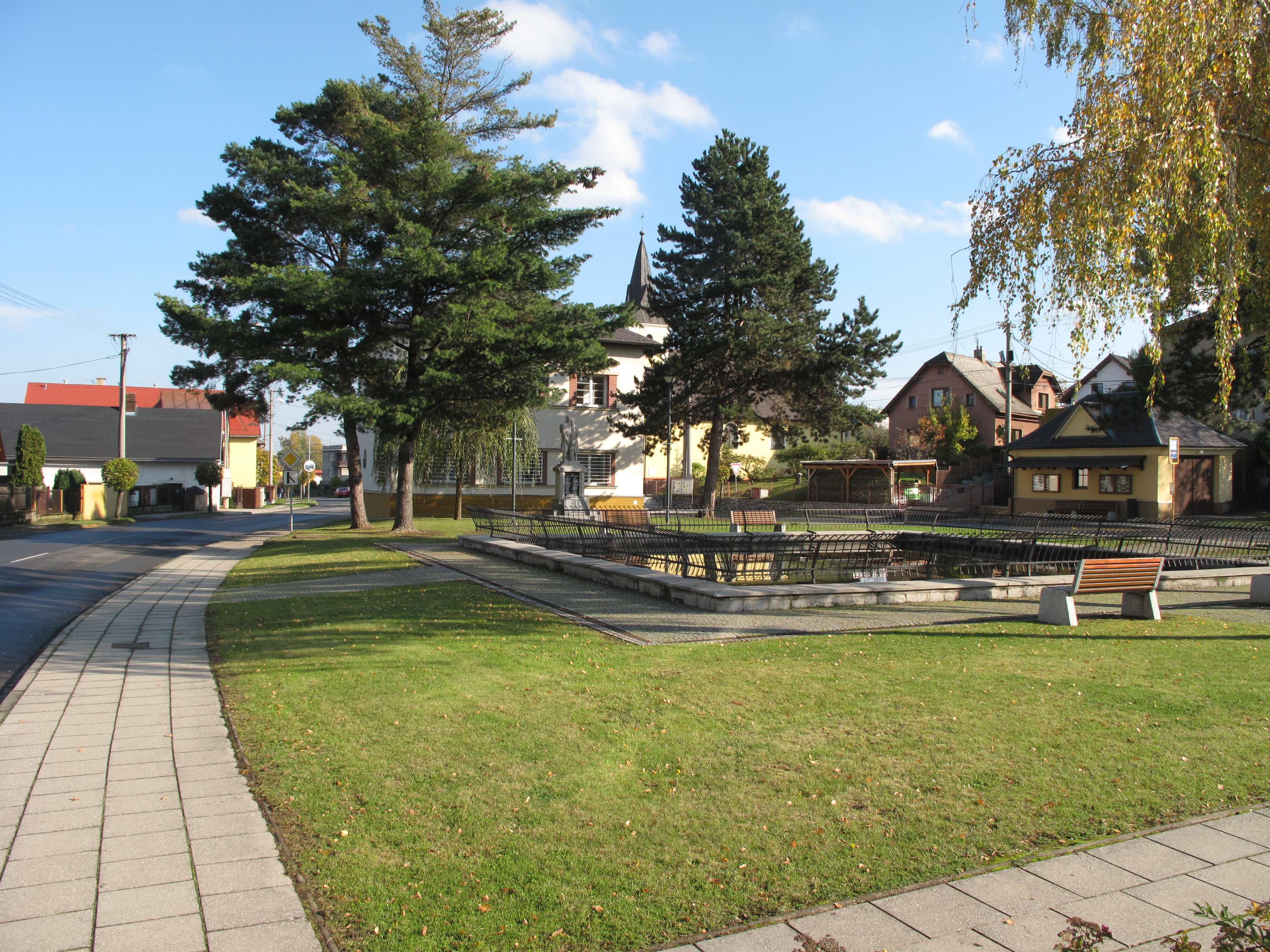 Suché Lazce. Okres Opava, Česká republika.